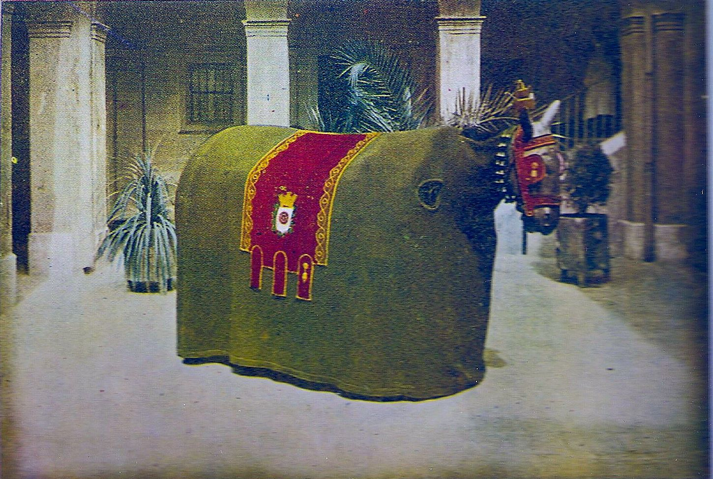 Postal de La Mulassa el 1923